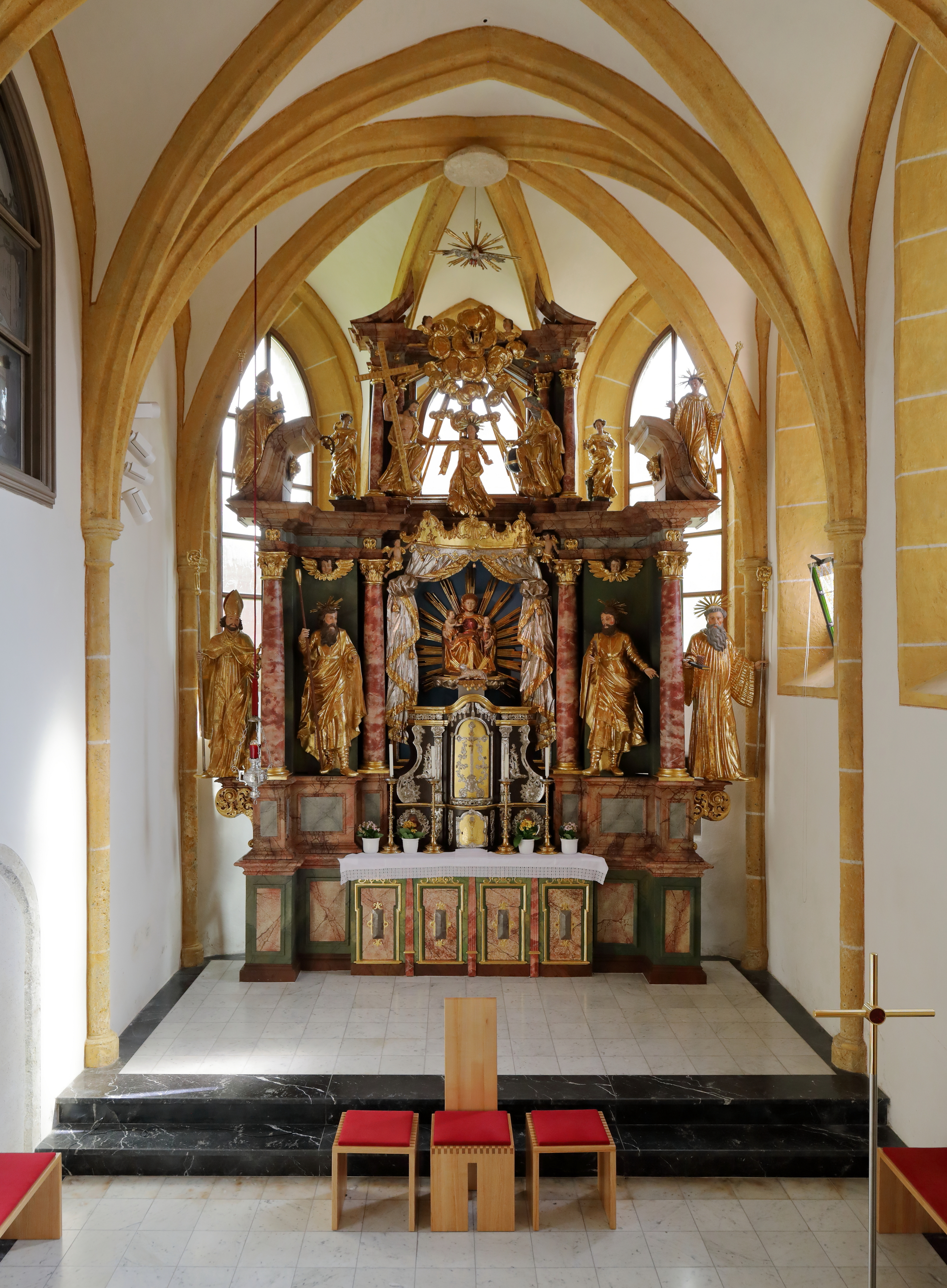 Hochaltar der röm.-kath. Pfarrkirche hl. Anna in der steirischen Marktgemeinde St. Marein im Mürztal.